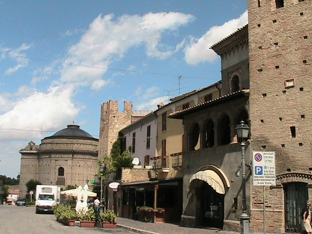 Mosciano Sant'Angelo